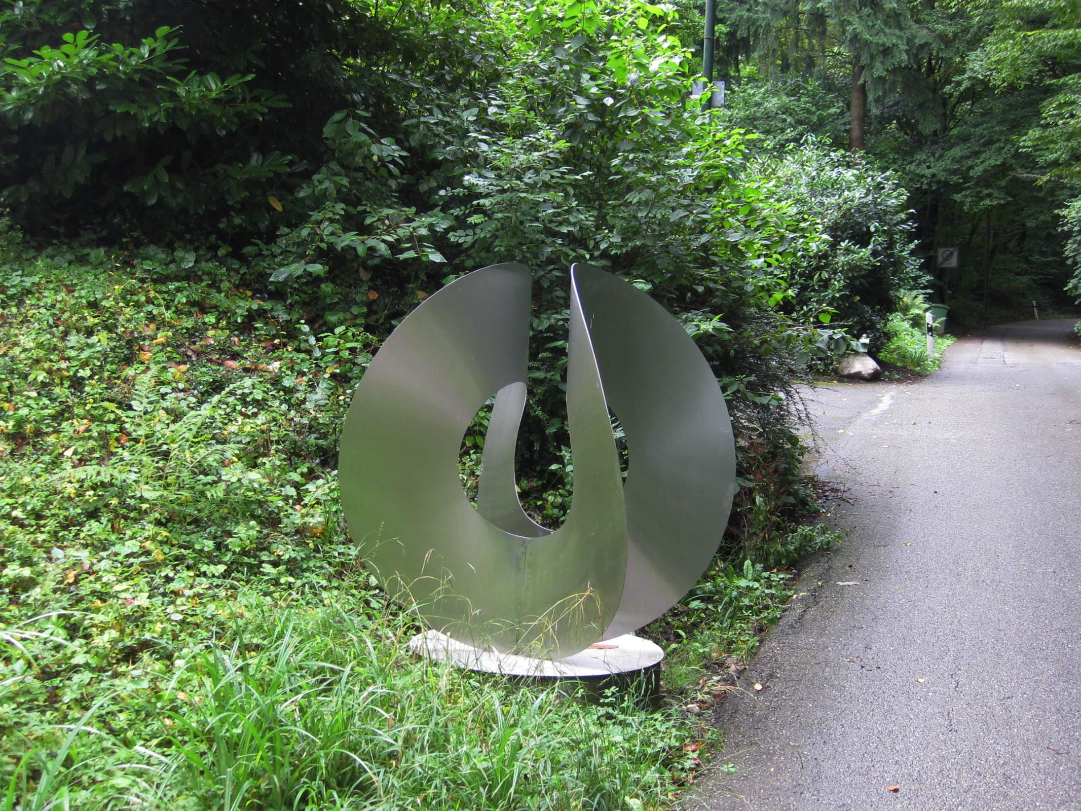 Roland Phleps, "Dipylon" (das Doppeltorige), 1992, H: 148 cm - Deutschland, Baden-Württemberg, Freiburg im Breisgau, bei der Skulpturenhalle der Stiftung für Konkrete Kunst